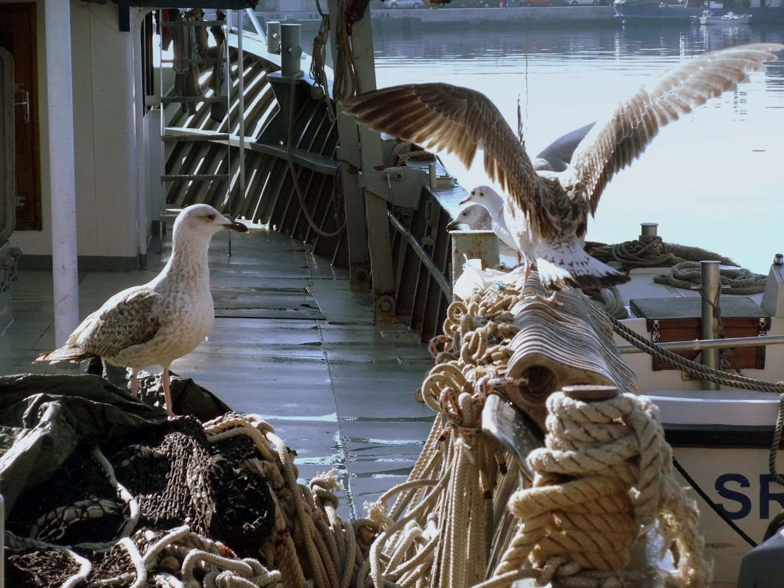 Rijeka - Seagulls and harbor